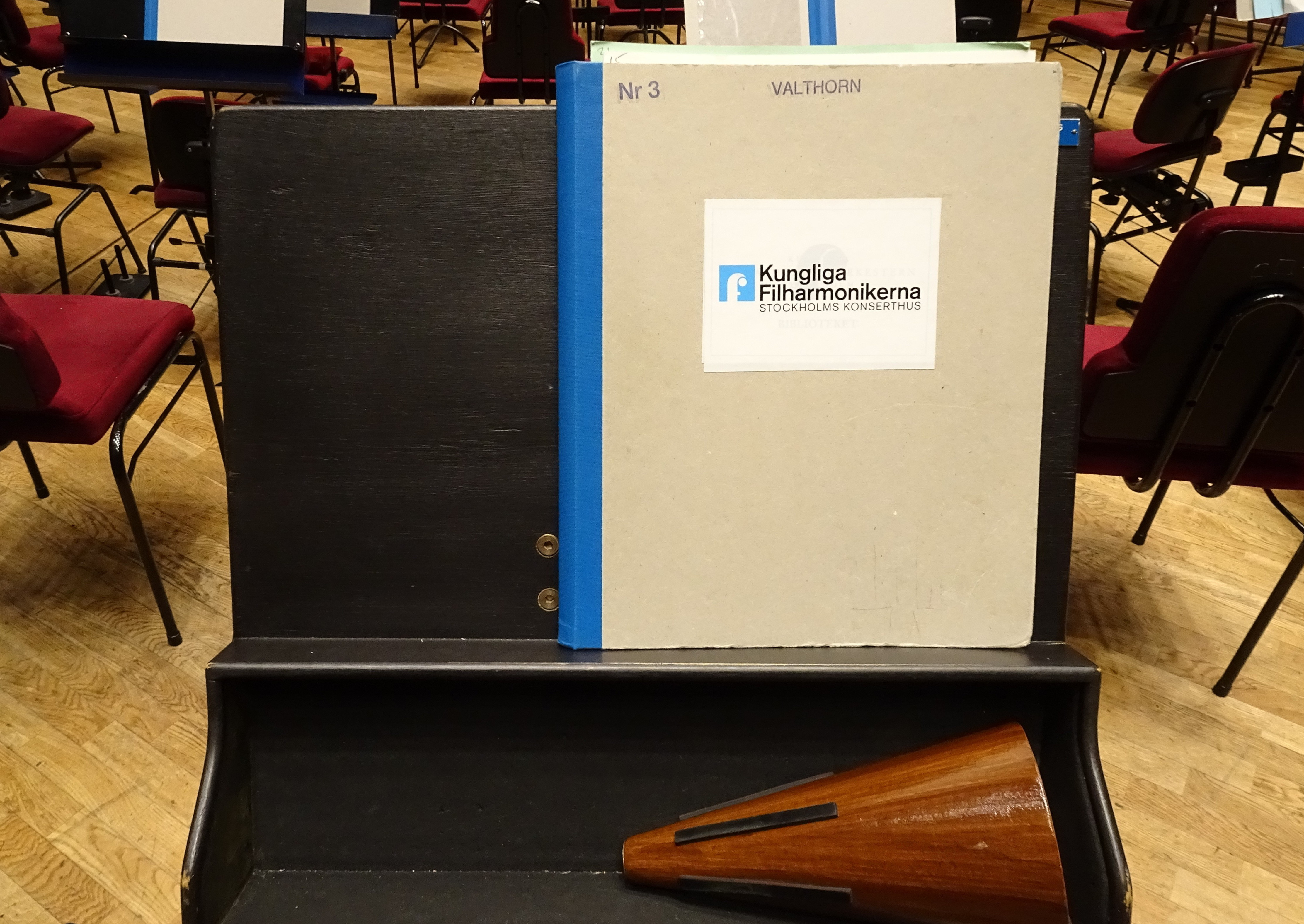 Konserthuset Stora Salongen, orkester